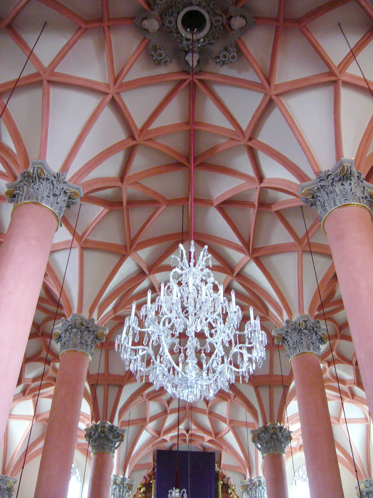 Gewölbe stadtpfarrkirche scheibbs